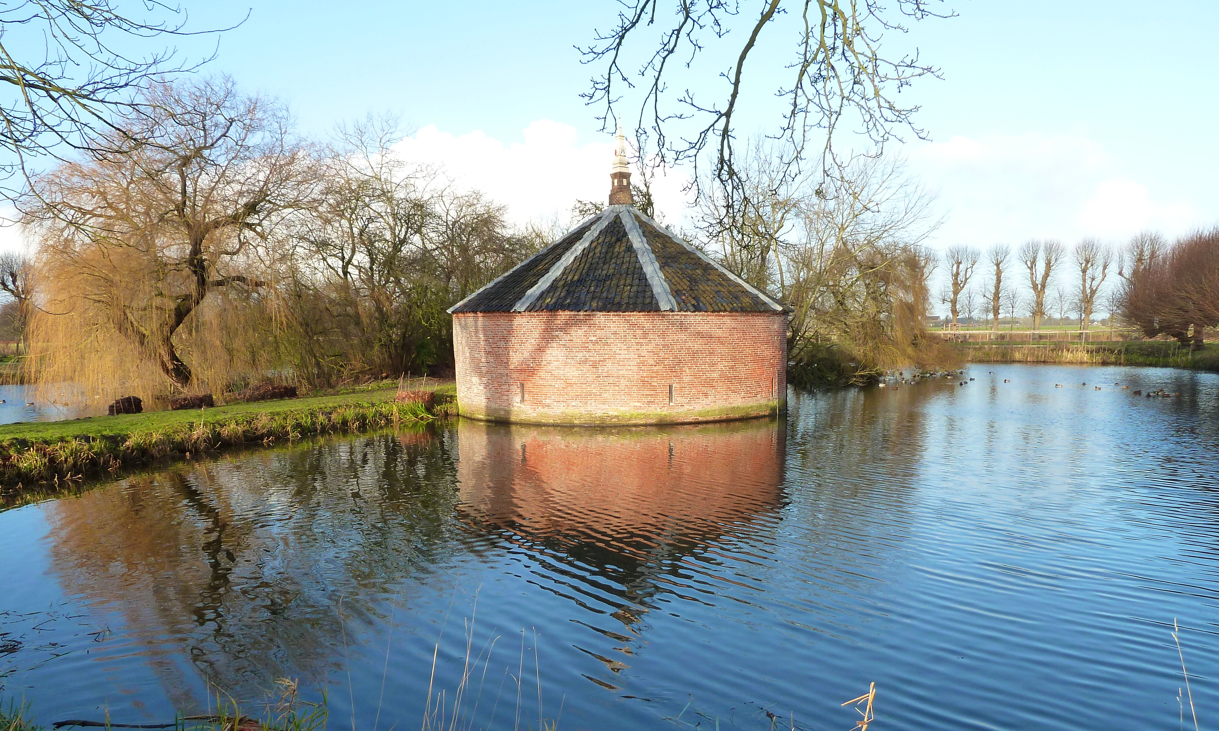 Borgstee en geschutstoren van Ewsum ten noorden van Middelstum